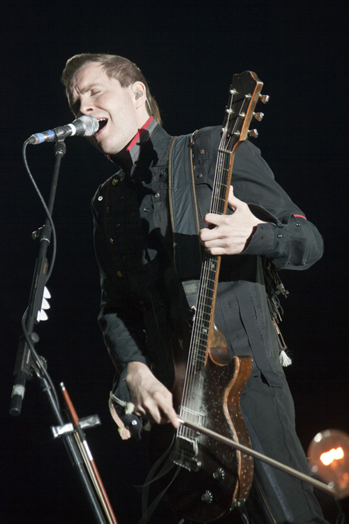 Jónsi, vocalista y guitarrista de Sigur Rós, actuando en el DCode Fest 2012 (Madrid).